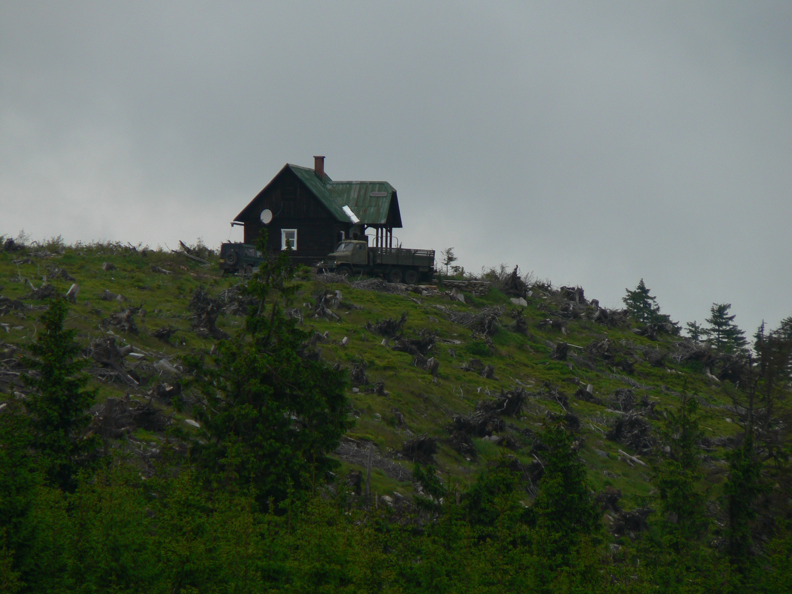 Heřmanovická chata v sedle mezi Orlíkem a Medvědím vrchem v Hrubém Jeseníku